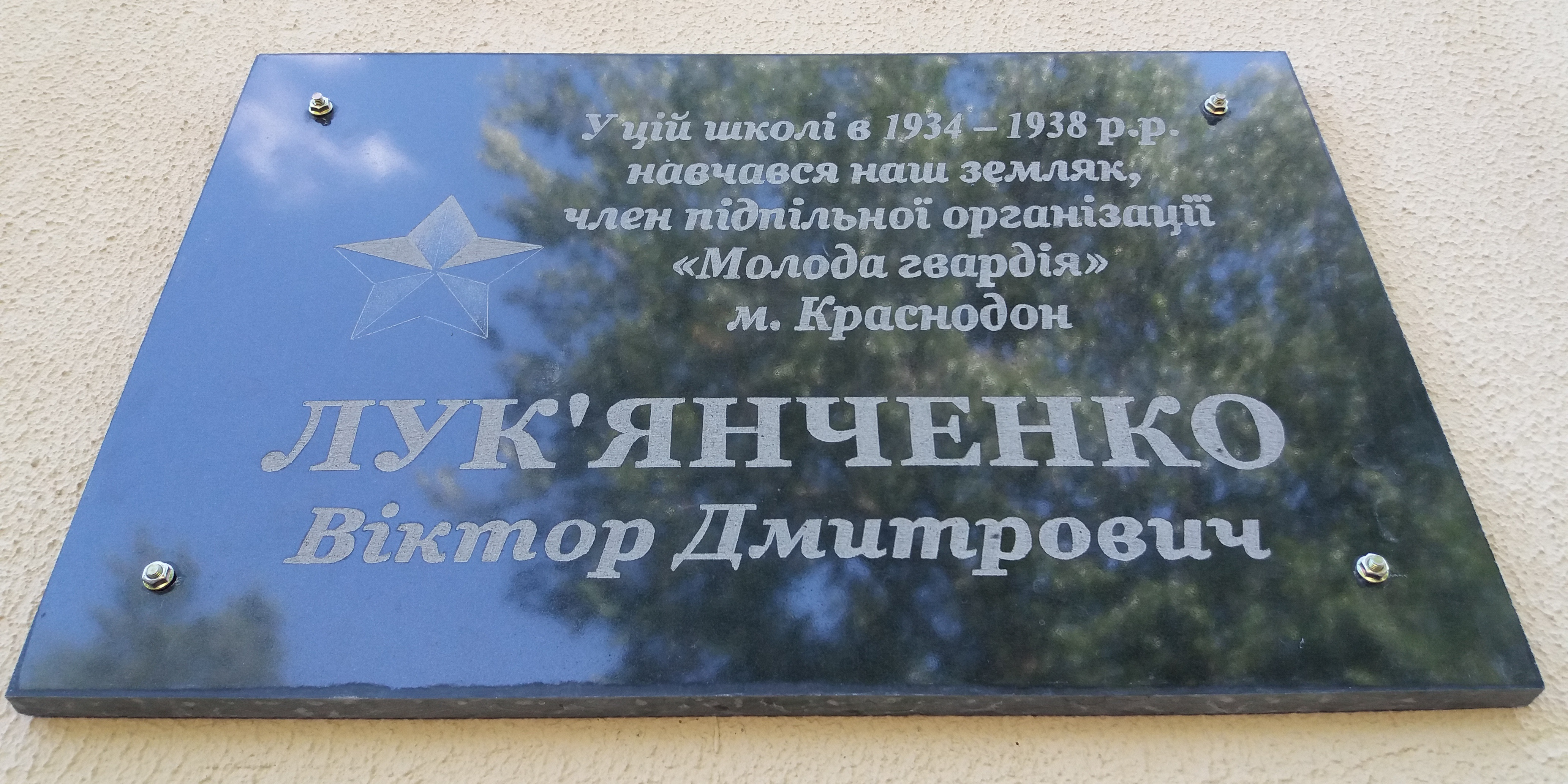 Меморіальна дошка на честь Лук'янченка Віктора Дмитровича на фасаді Солоницької школи Козельщинського району Полтавської області